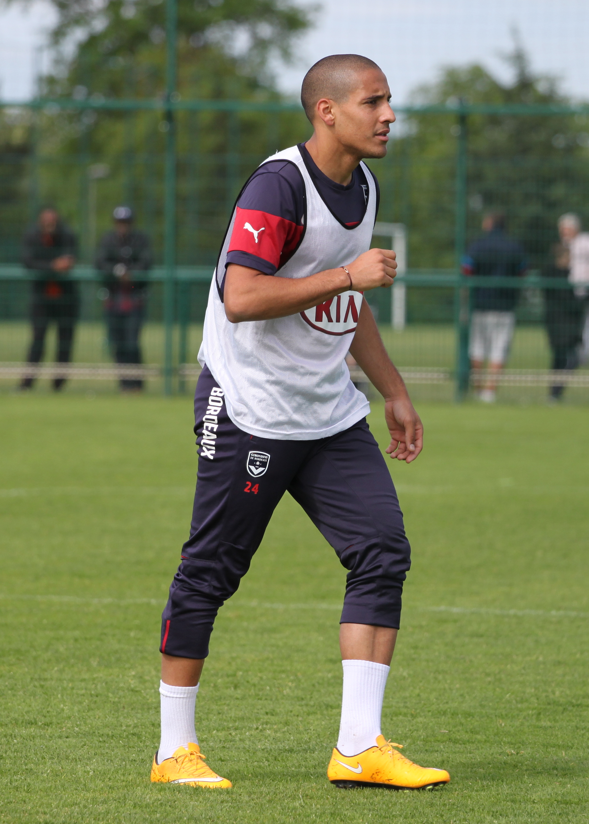 Khazri à l'entraînement.